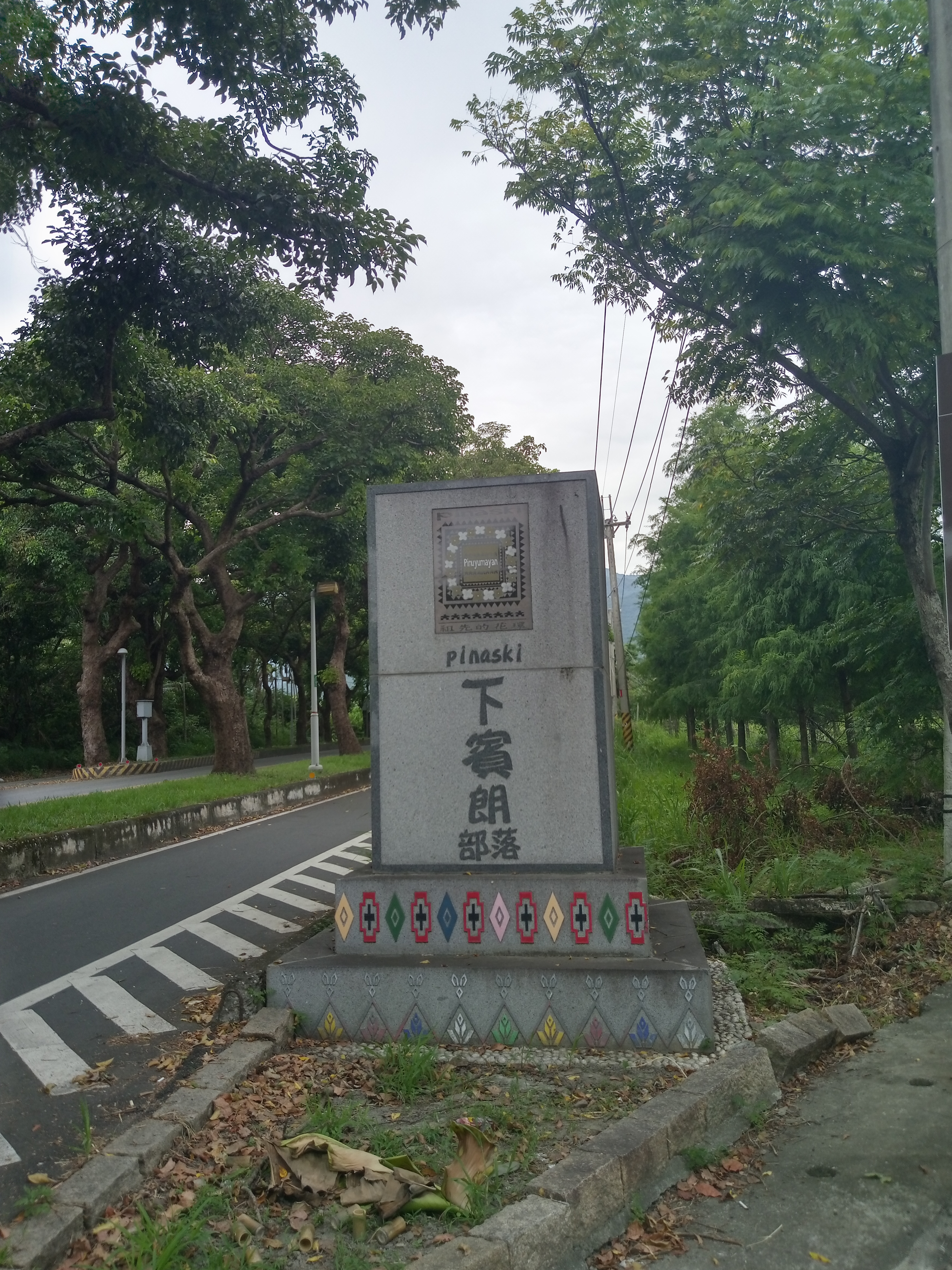 中文（台灣）: 下賓朗部落標題